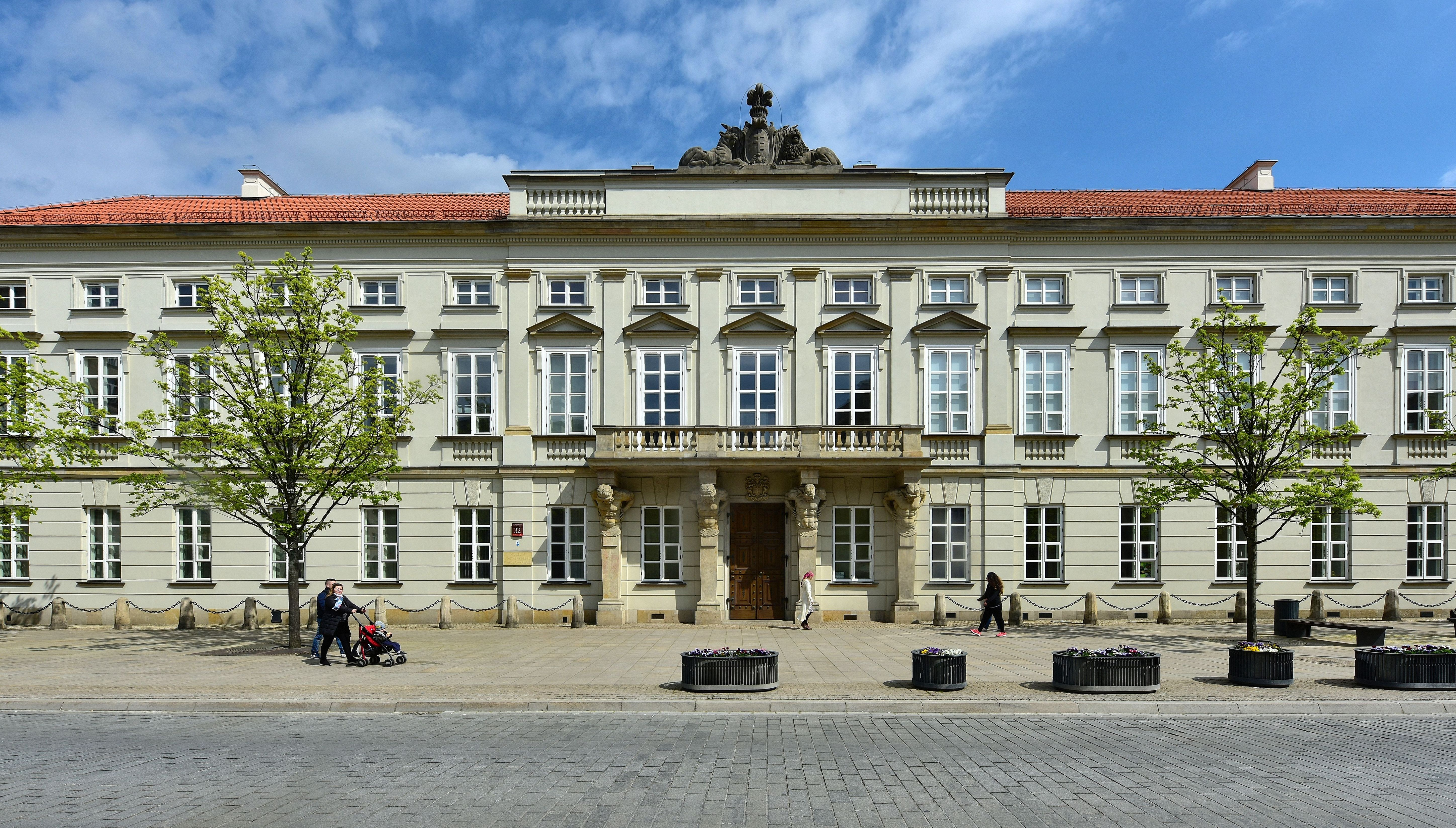 Pałac Tyszkiewiczów (Potockich) w Warszawie